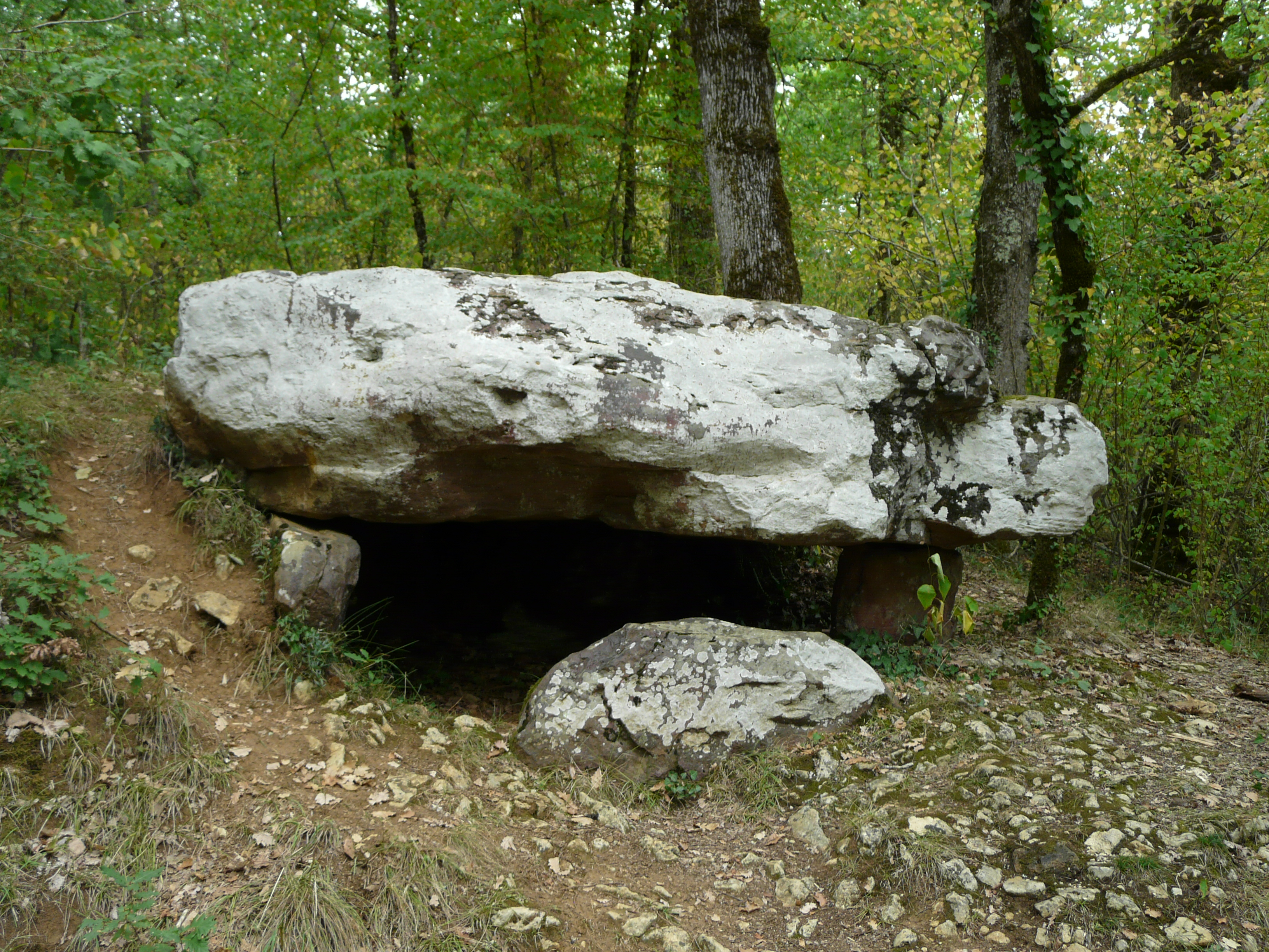 Le dolmen de Cantegrel, Saint-Chamassy, Dordogne, France. .